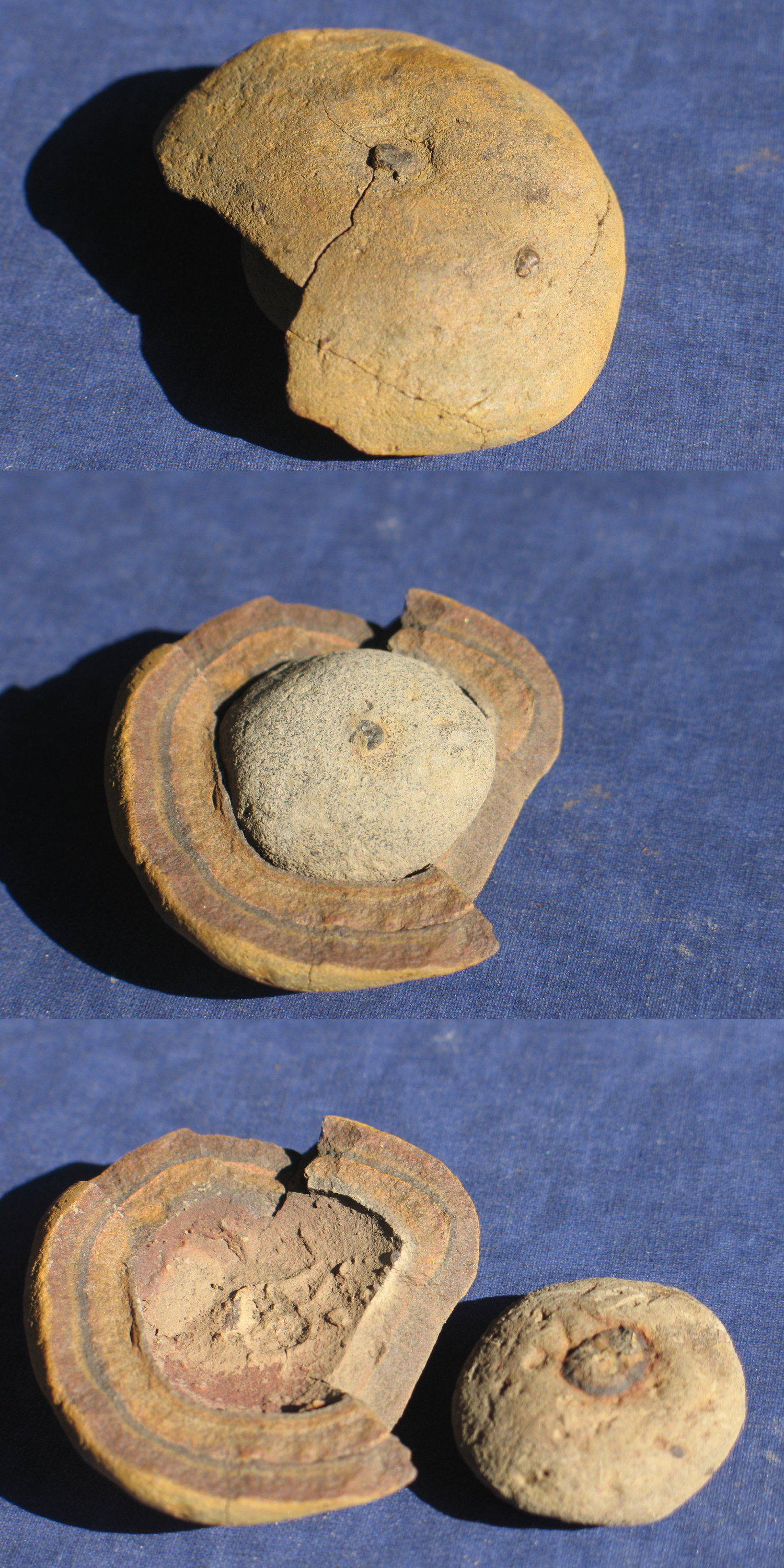 Geode, Tongrube der Ziegelei an der Bergstraße, Preußisch Oldendorf (1972)